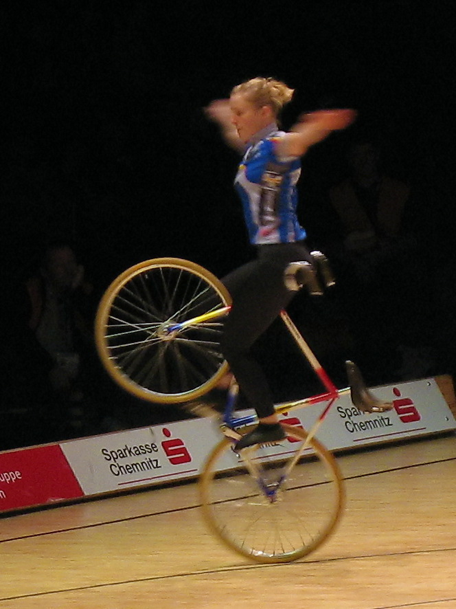 Artistic cycling competition at the UCI Indoor Cycling World Championships 2006 in Chemnitz (Germany)